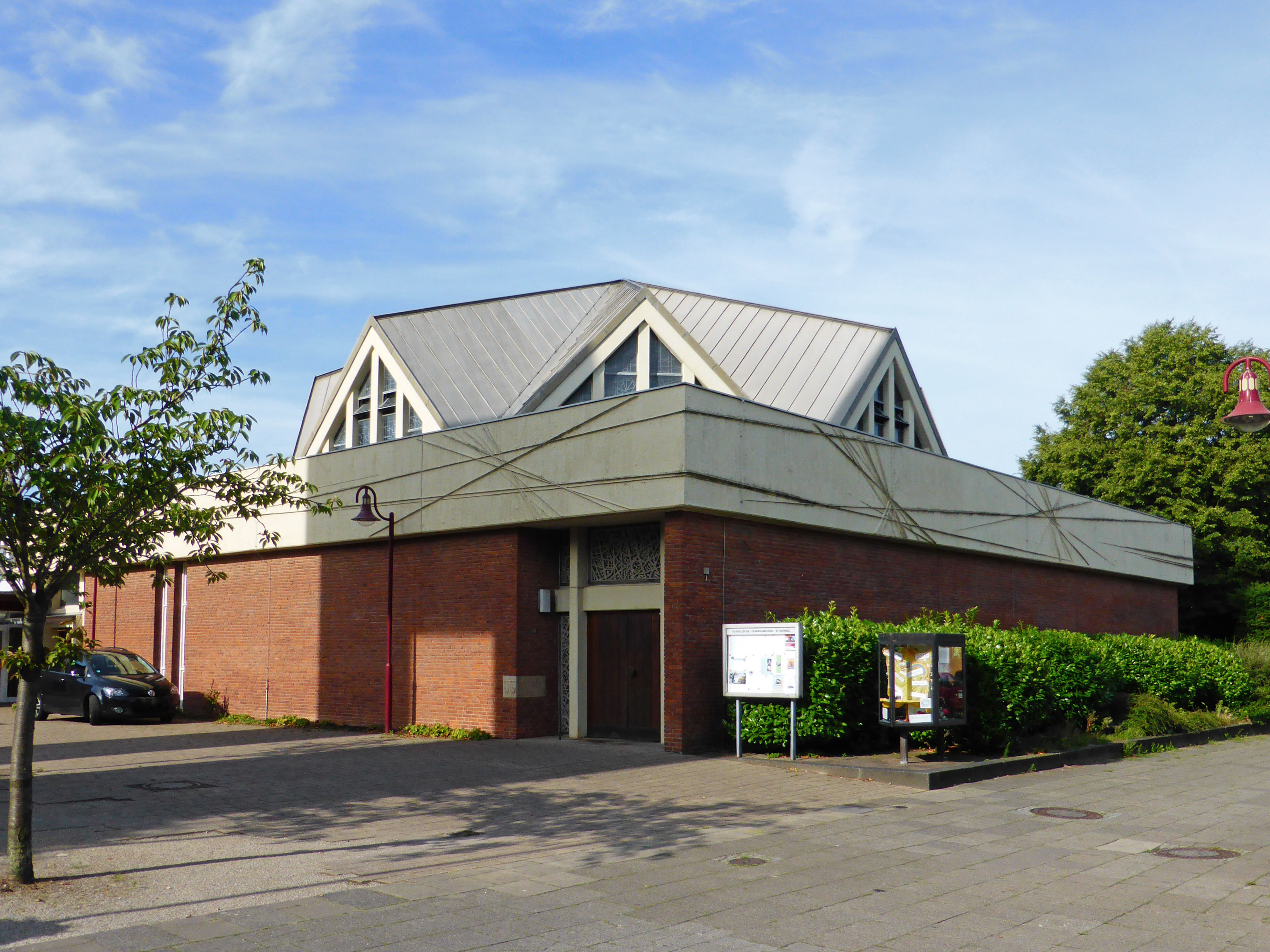 Kirchenschioff der katholischen St.-Raphael-Kirche in Garbsen.